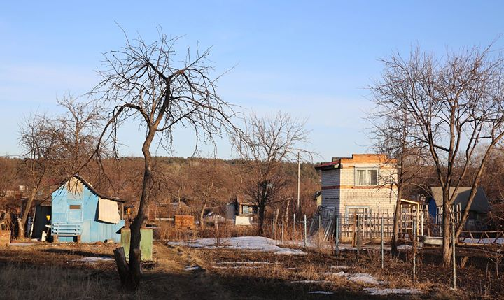 Дачи, огороды, сараи